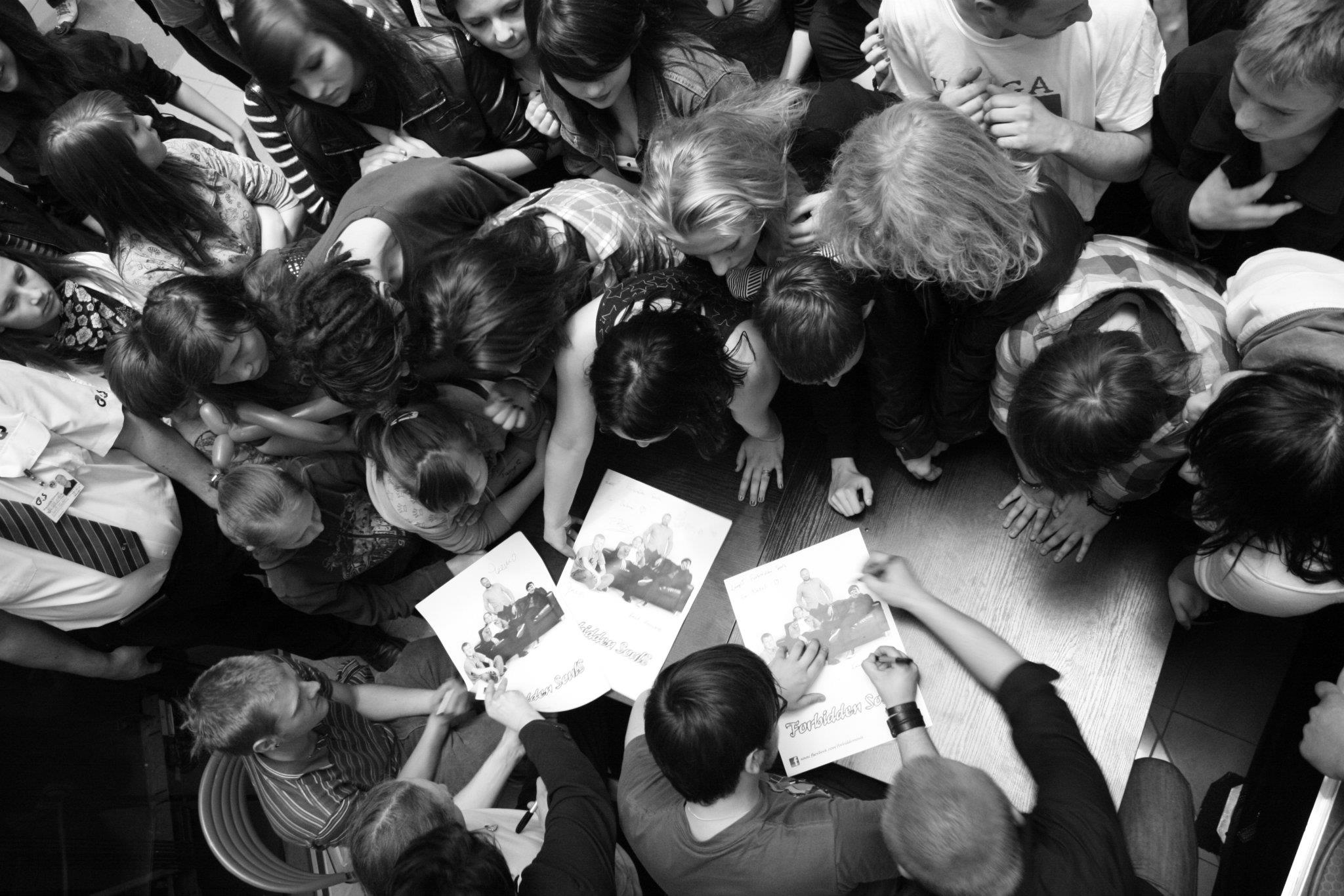 Koncert w CH Panorama, 2012r.